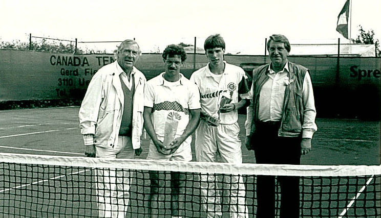 Michael Stich gewinnt Stör-Pokal 1987, Siegerehrung (v.l.n.r.: Thießen, Braasch, Stich, Struck)